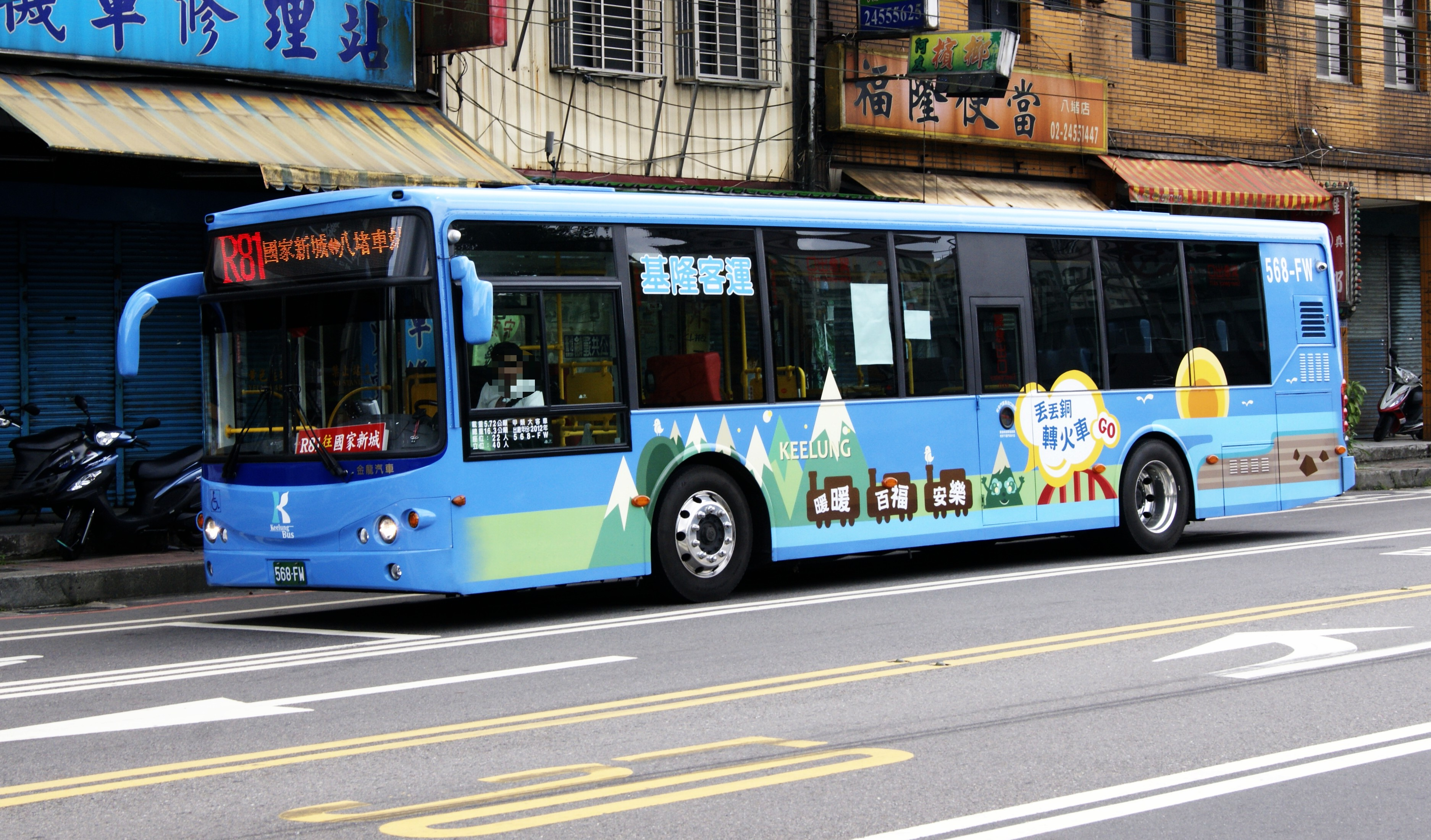 基隆客運丟丟銅轉火車彩繪公車568-FW